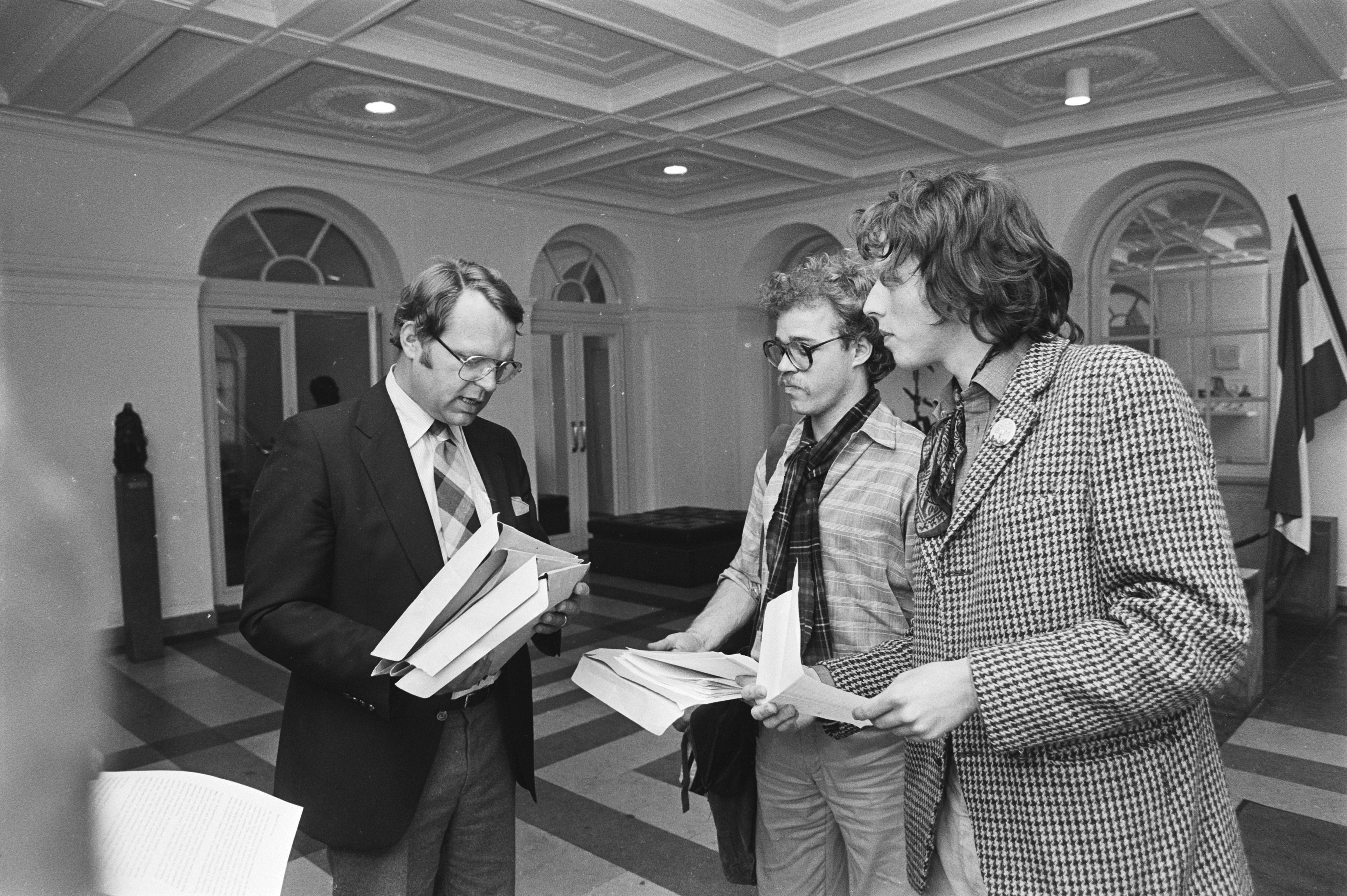 Voorzitter Commissie voor Defensie (Klaas de Vries, PvdA) neemt VVDM-petitie aan. V.l.n.r.: Klaas de Vries, onbekend VVDM-bestuurslid en VVDM-secretaris Ybo Buruma. Gebouw Tweede Kamer Den Haag (Nederland), 27 aug. 1980